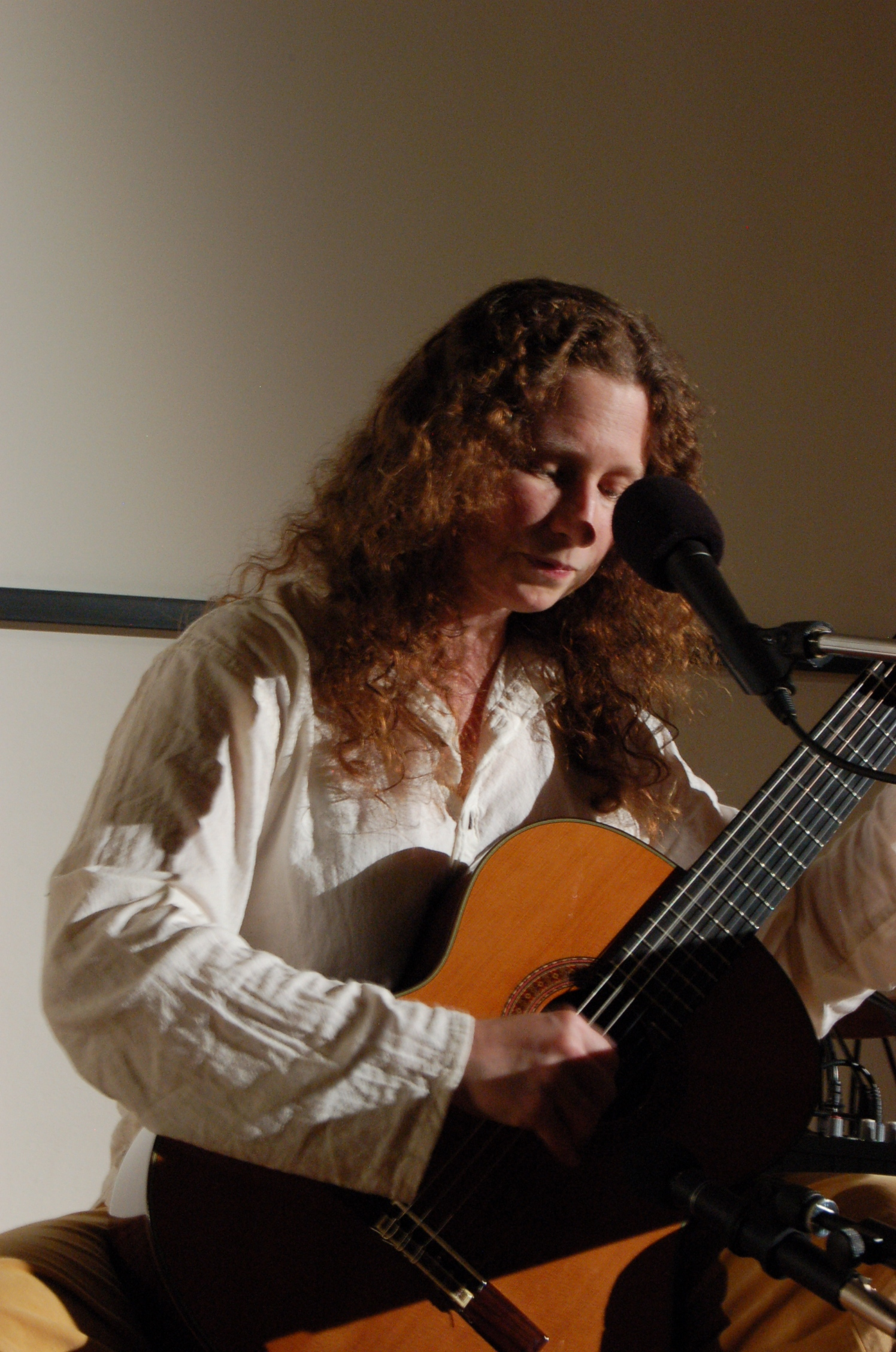 Eva Henychová na Celostátním setkání animátorů seniorů v Hradci Králové, dne 5. 11. 2010